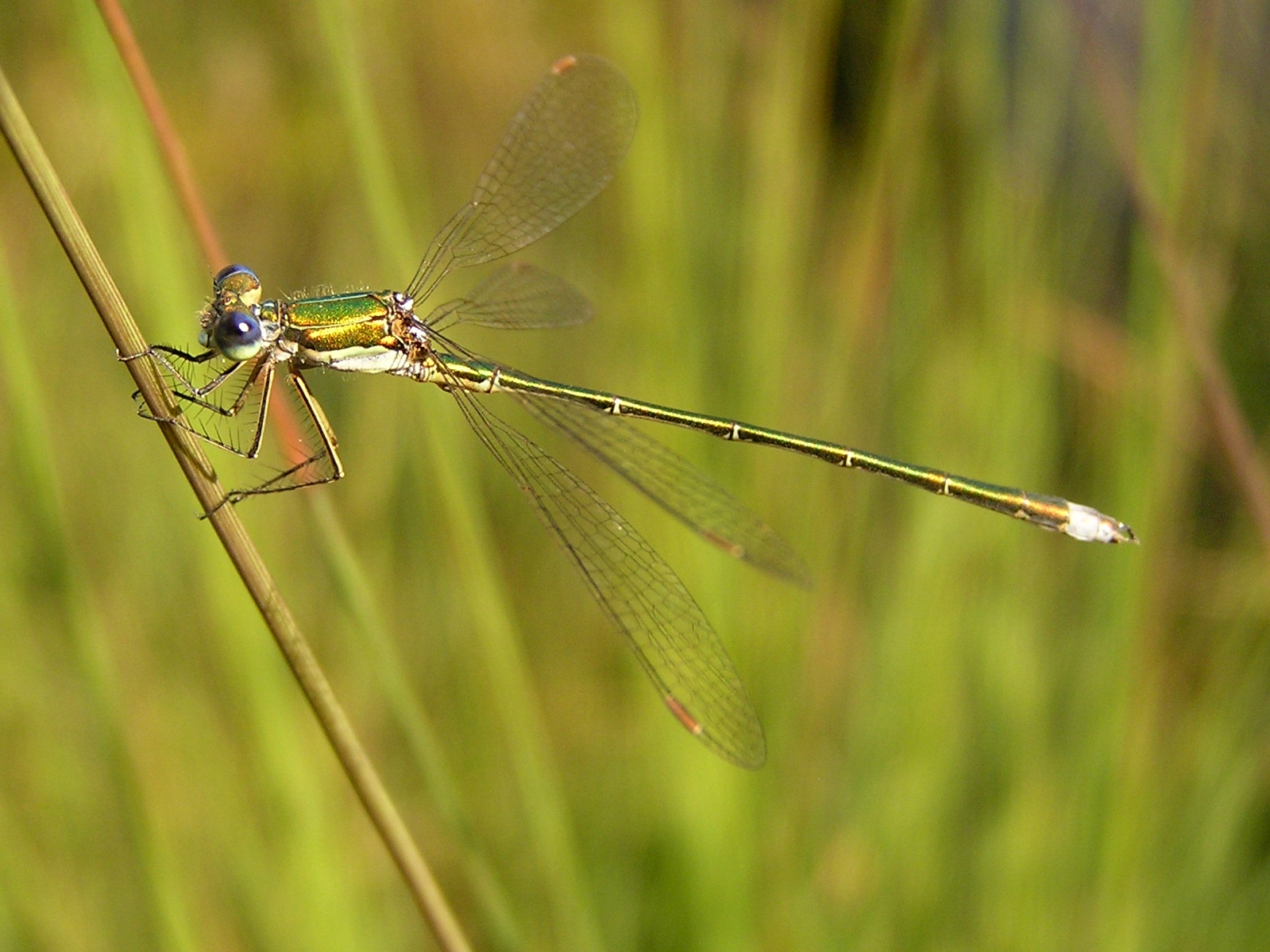 Kleine Binsenjungfer (Lestes virens)